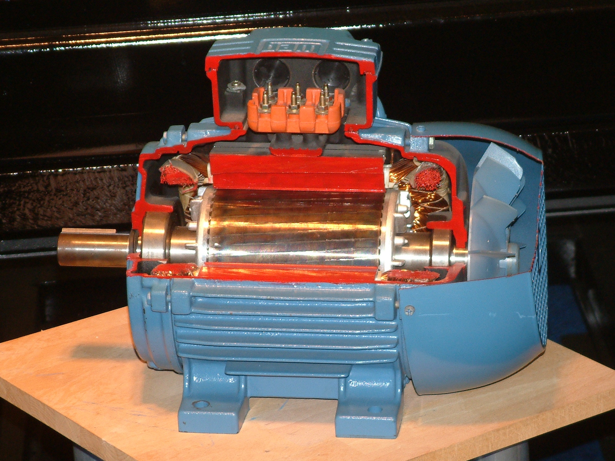 Europort 2009